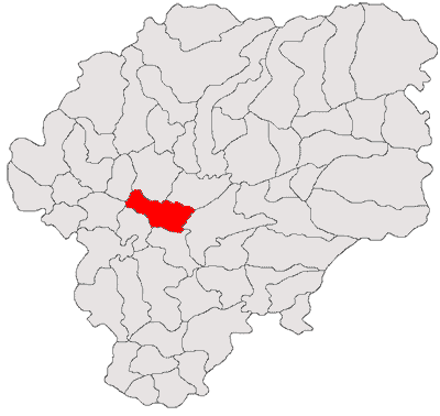 Categorie:Hărţi ale judeţului Bistriţa-Năsăud